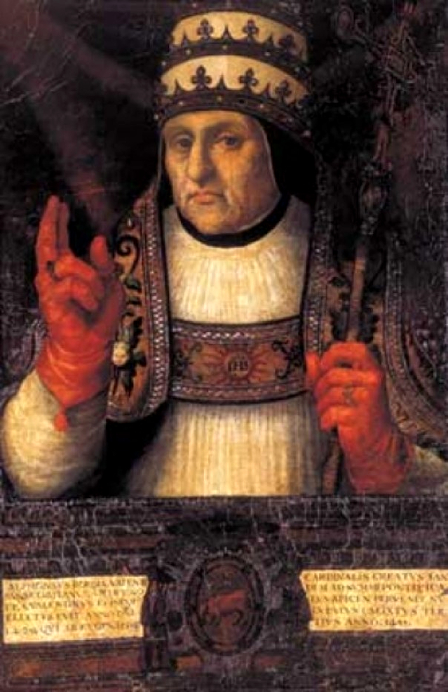 Retrato del eclesiástico español Alfonso de Borja y Cavanilles (1378-1458), que posteriormente llegaría a ser papa de la Iglesia Católica con el nombre de Calixto III.